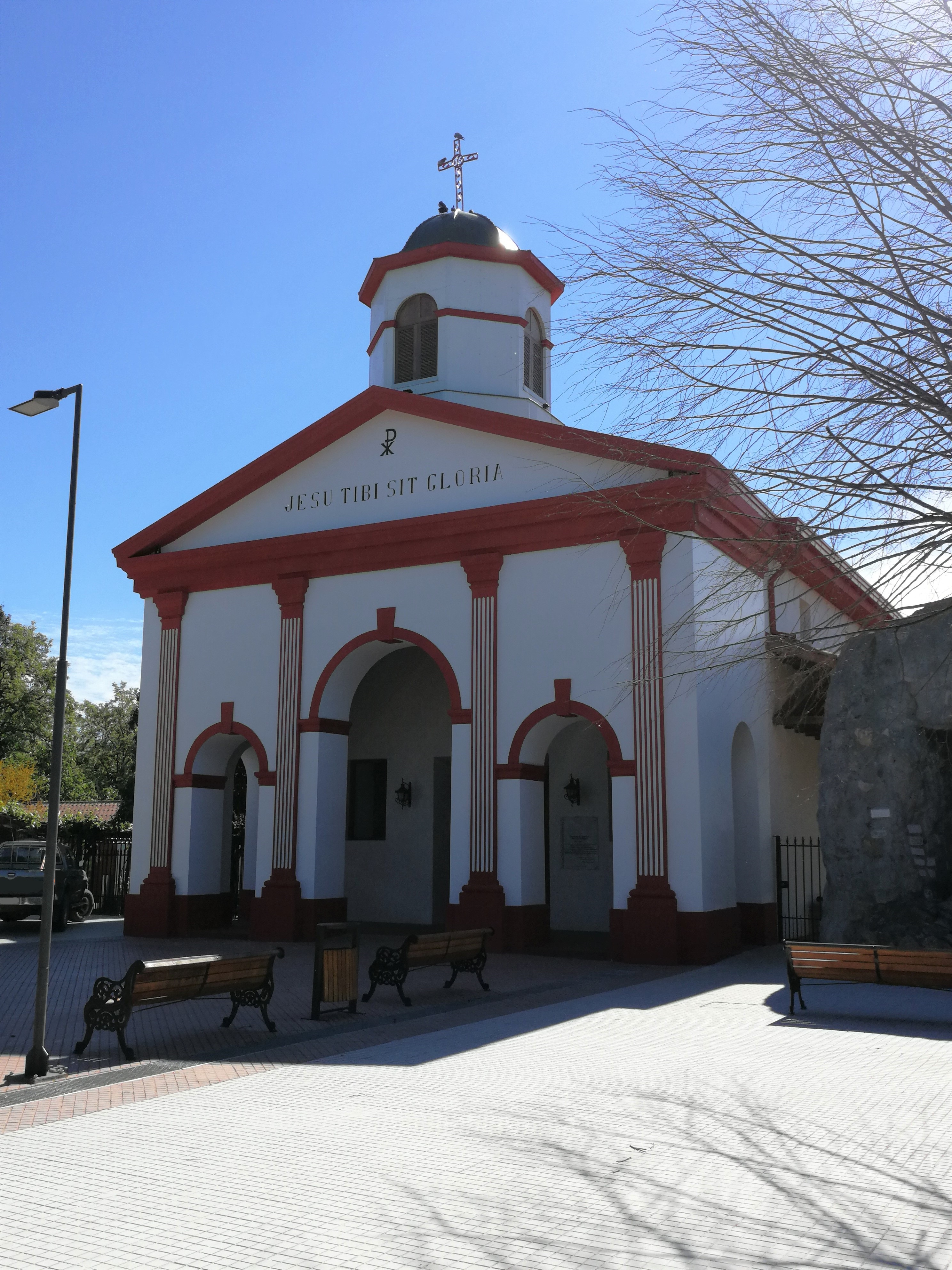 Templo y plaza